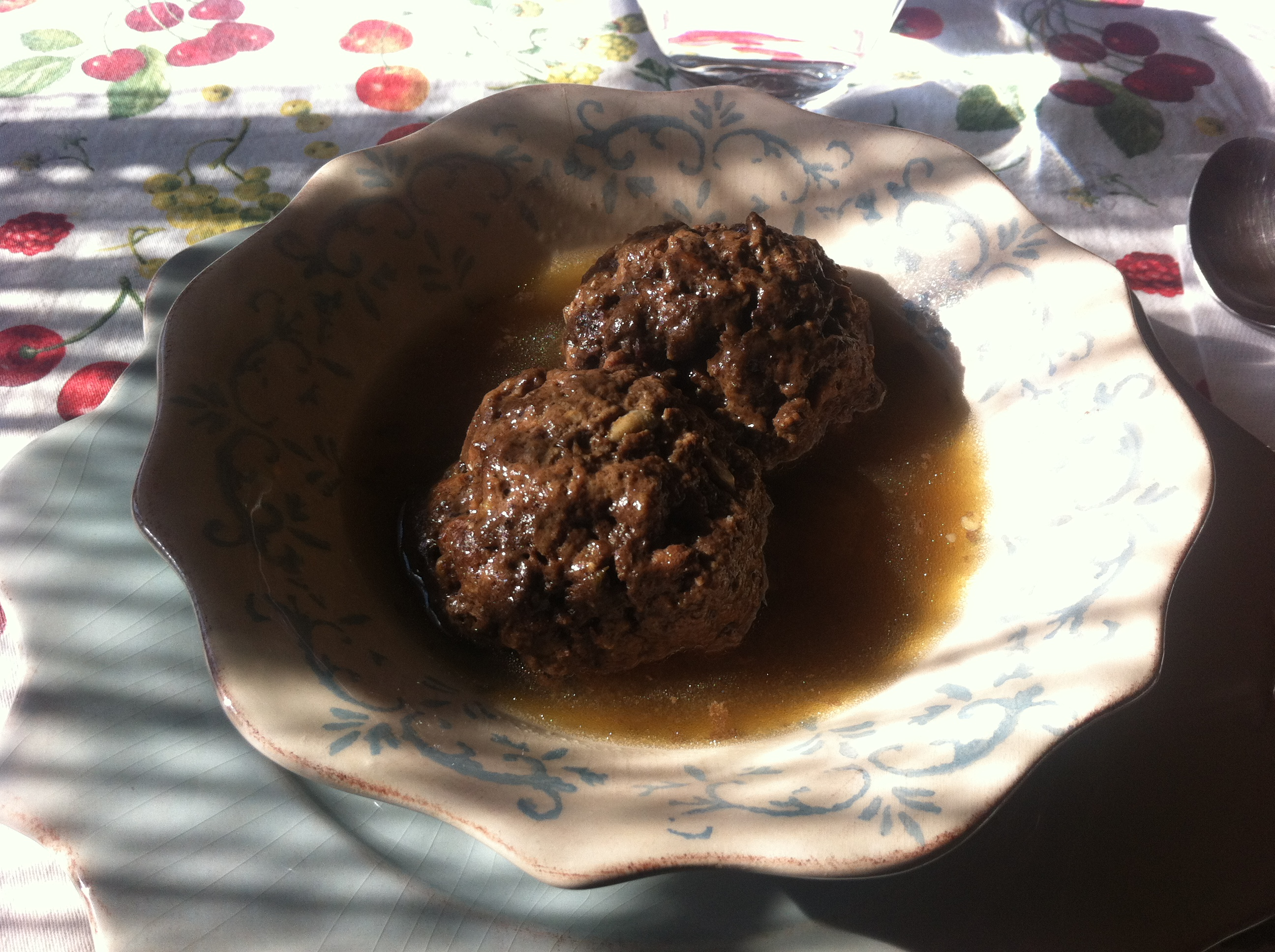 Las faseguras o "fasegures" (en valenciano) añadidas al cocido, es un plato tradicional.